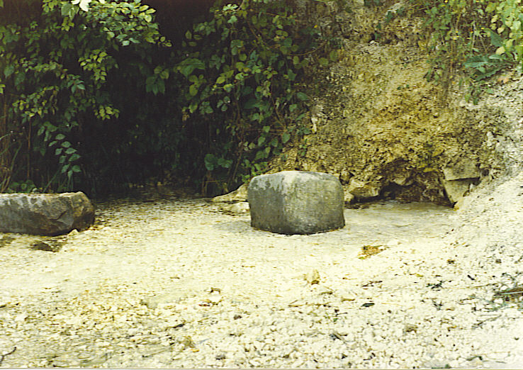 zelf gemaakt